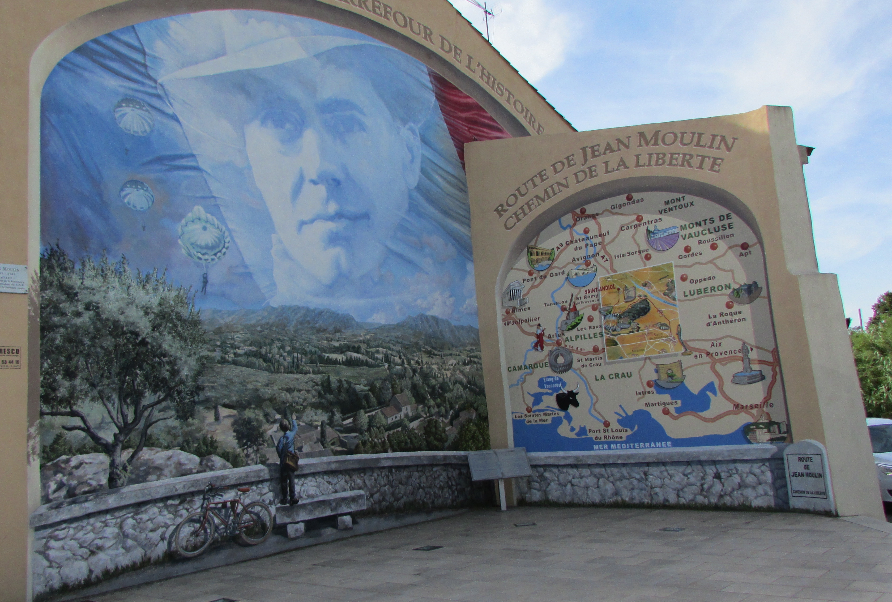 Trompe-l'oeuil hommage à Jean Moulin.